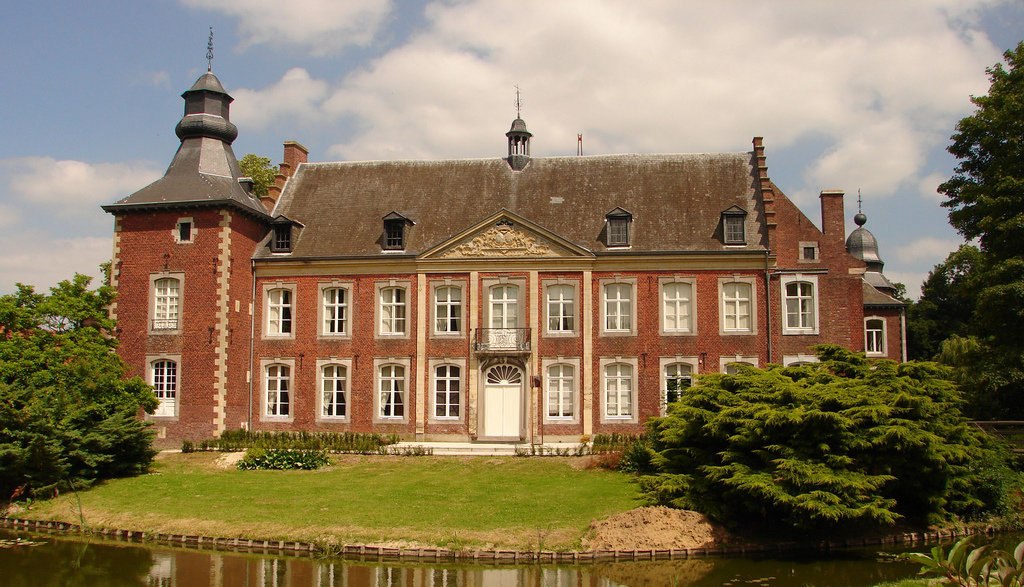 Hoofdgebouw van het kasteel van Hoepertingen